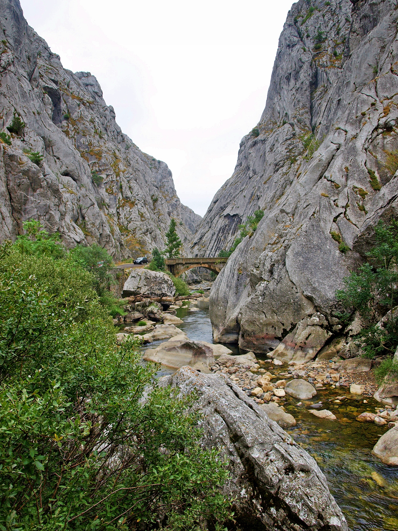 Las Hoces de Vegacervera y el río Torío